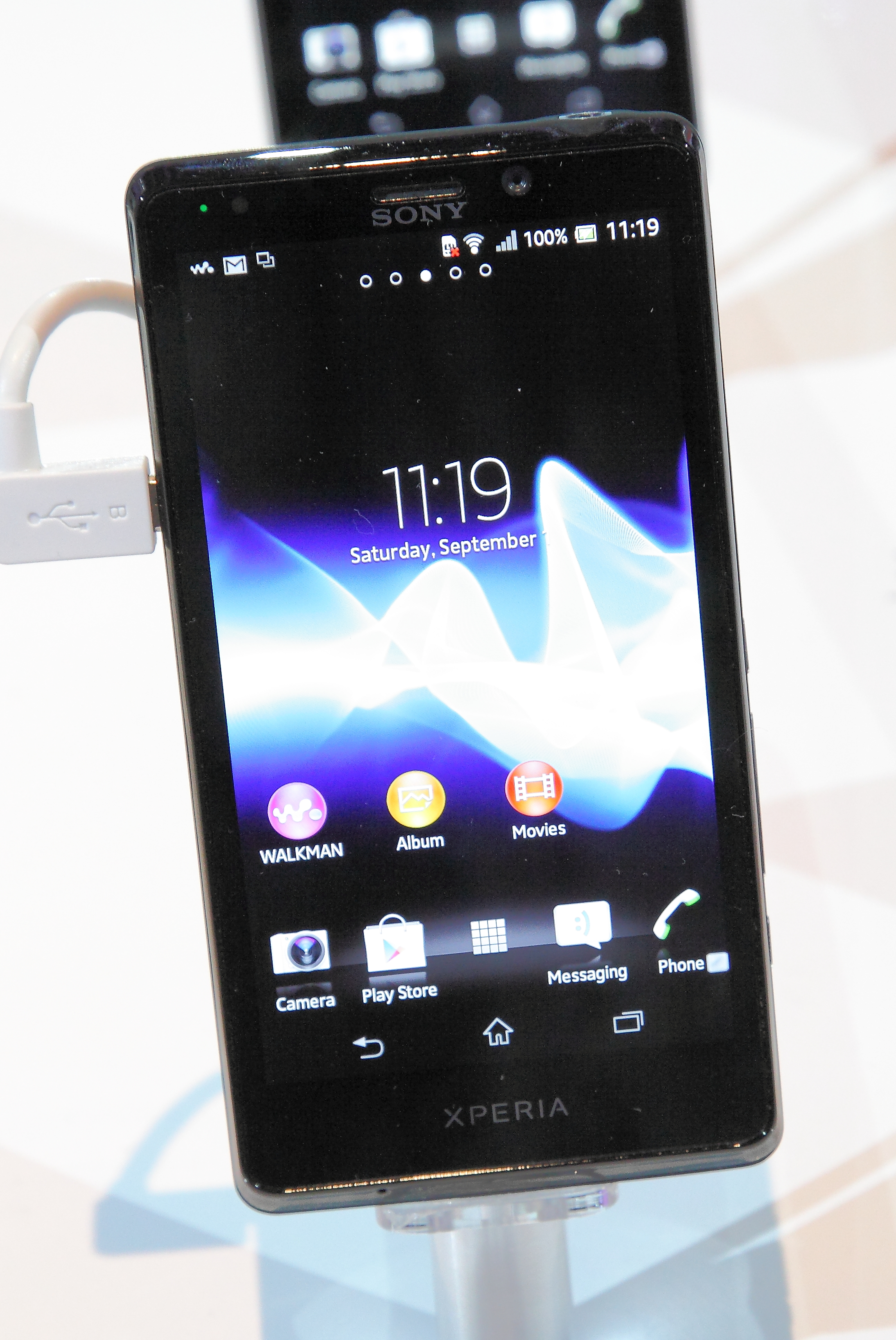 Xperia Tablet S; SGPT12/SGPT13 (SPGDS4); bei Sony auf der Internationalen Funkausstellung 2012 in Berlin